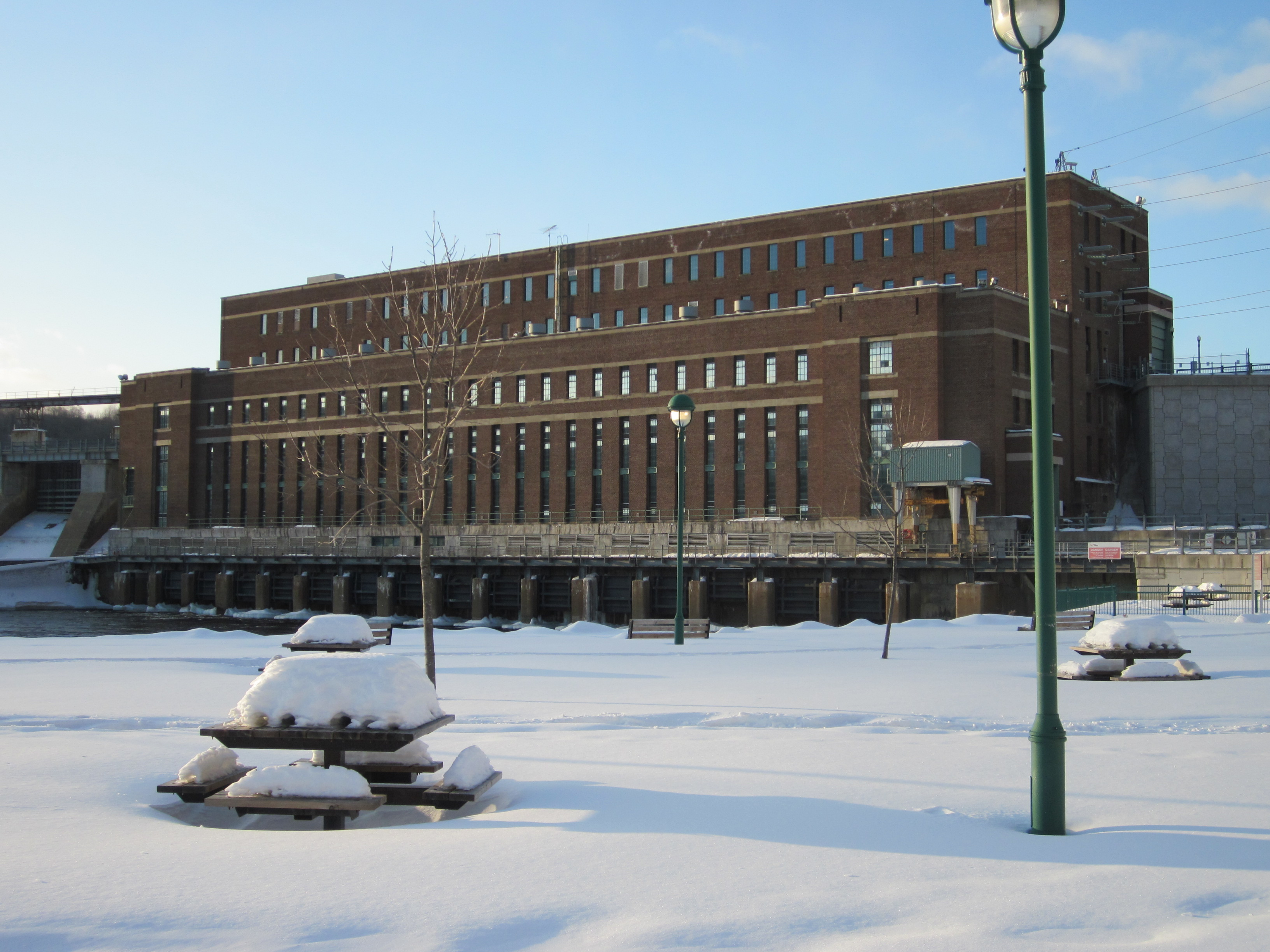 Centrale de La Gabelle vue de la rive de Notre-Dame-du-Mont-Carmel